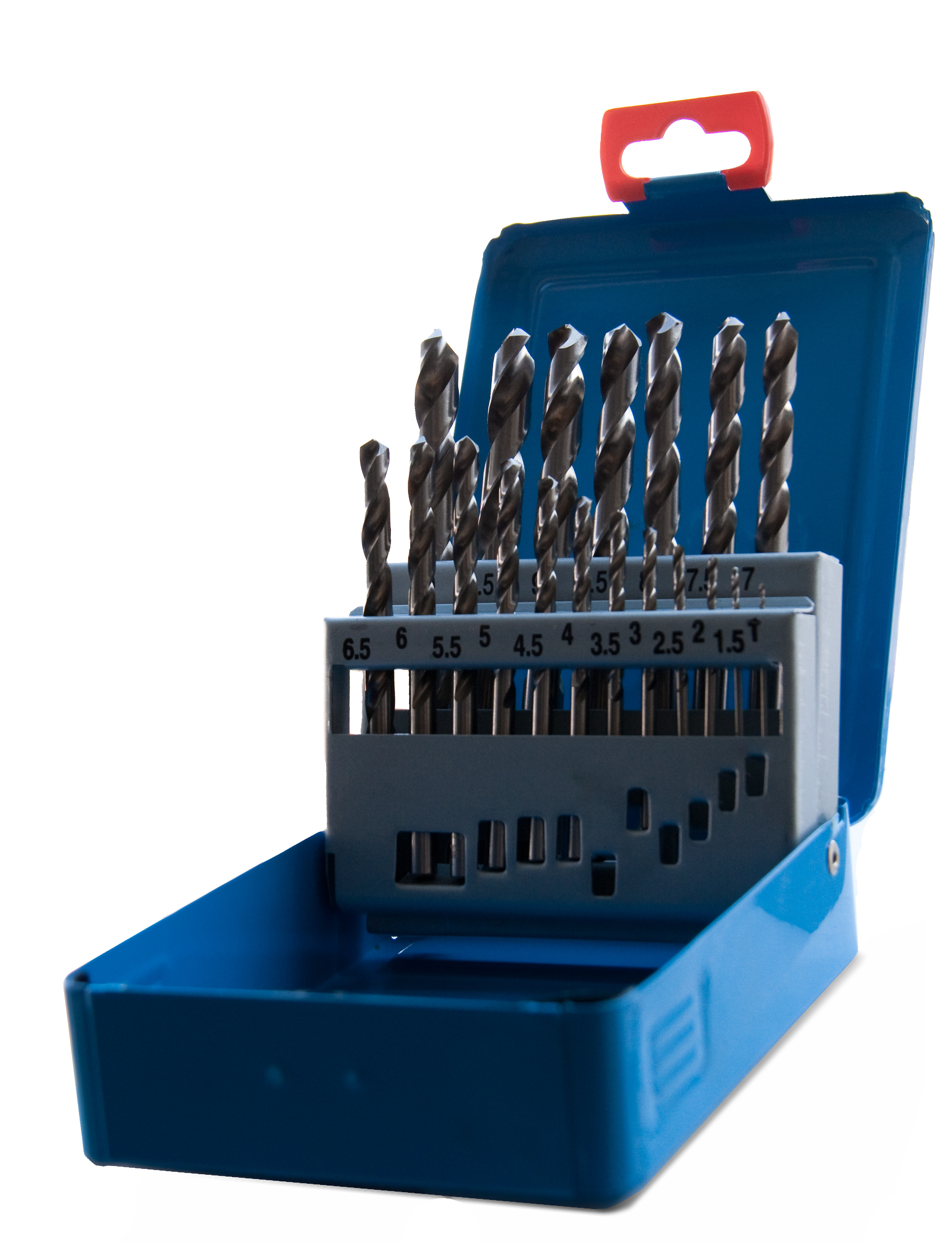 vrtáky do želetza, sada, kobalt